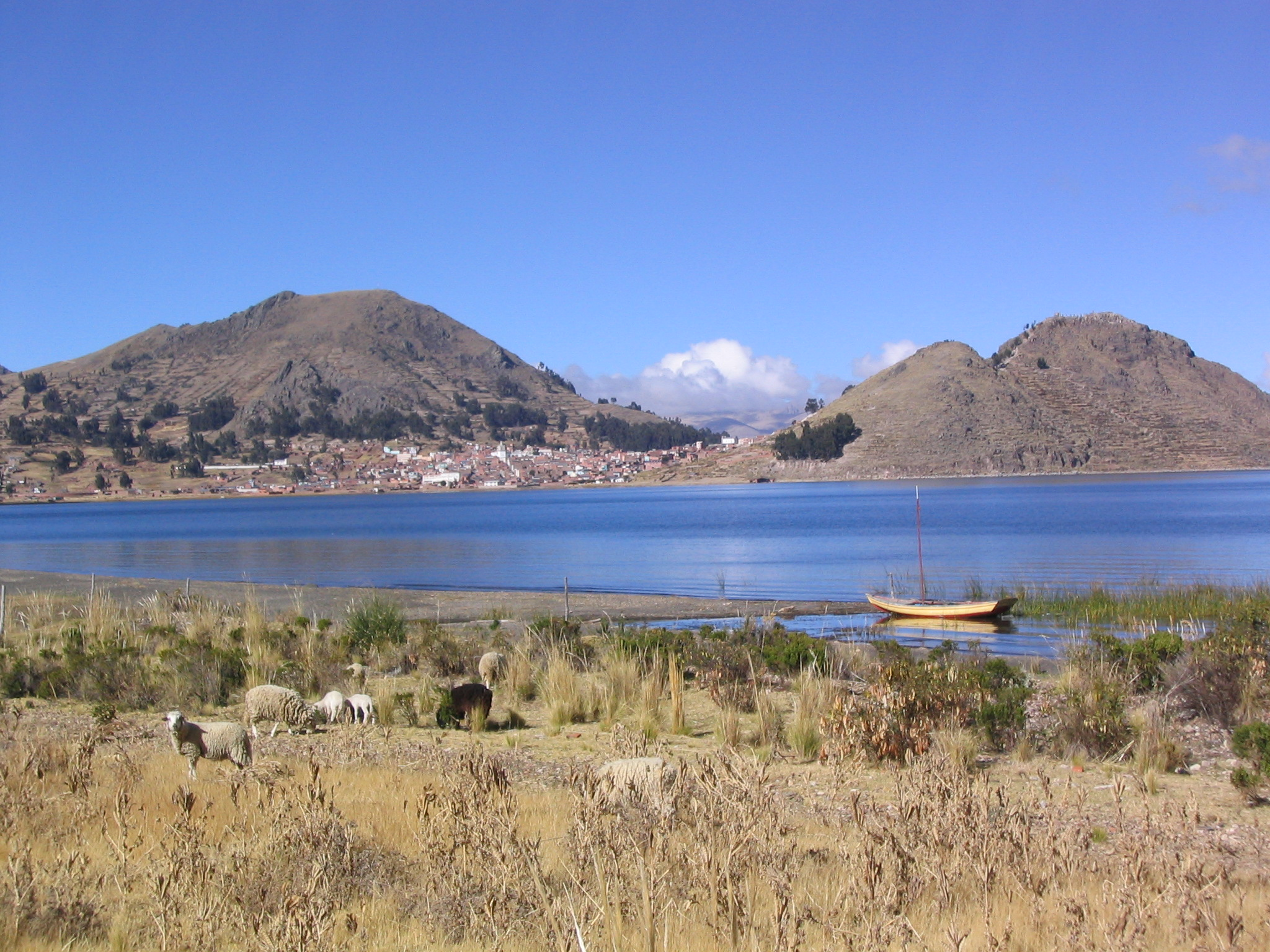 Agriculture in Bolivia.